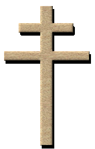 Croix de lorraine par moi-même